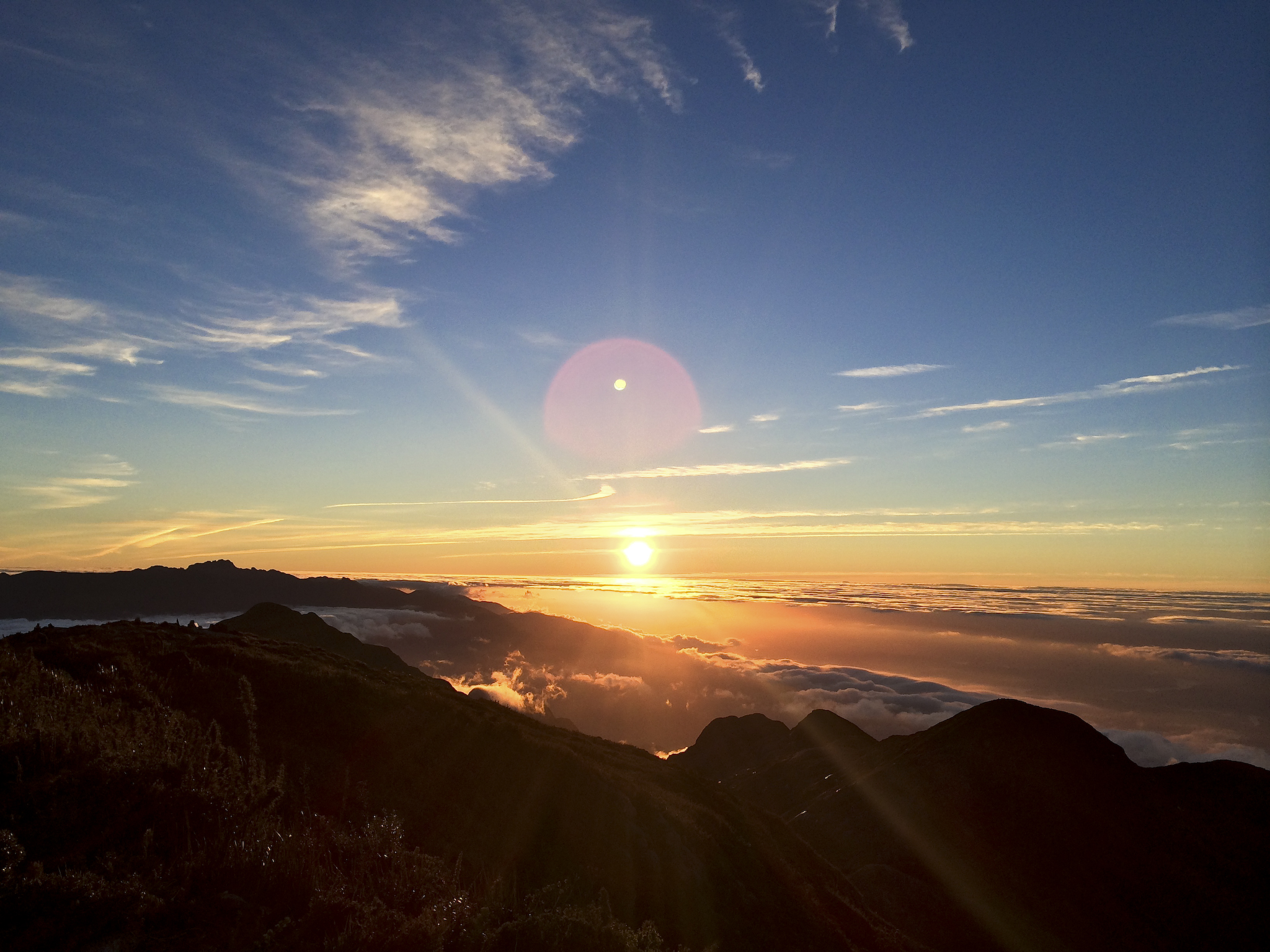 A Pedra da Mina é a quinta montanha mais alta do Brasil e está situada na Serra da Mantiqueira, na divisa do estado de São Paulo com o estado de Minas Gerais. Sua altitude é de 2.798m. Ao lado é possível enxergar as montanhas que compõem a parte alta do Parque Nacional do Itatiaia-RJ, como o Pico das Agulhas Negras.